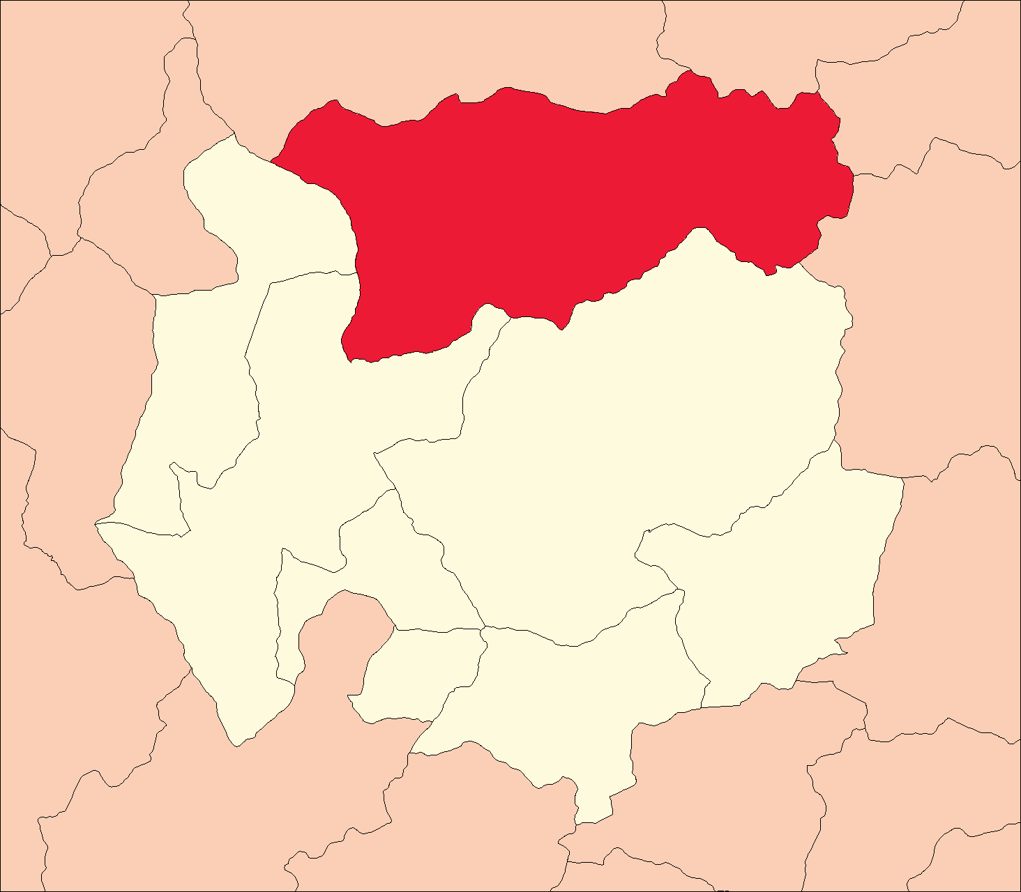 Ubicación del distrito de Aparicio Pomares.